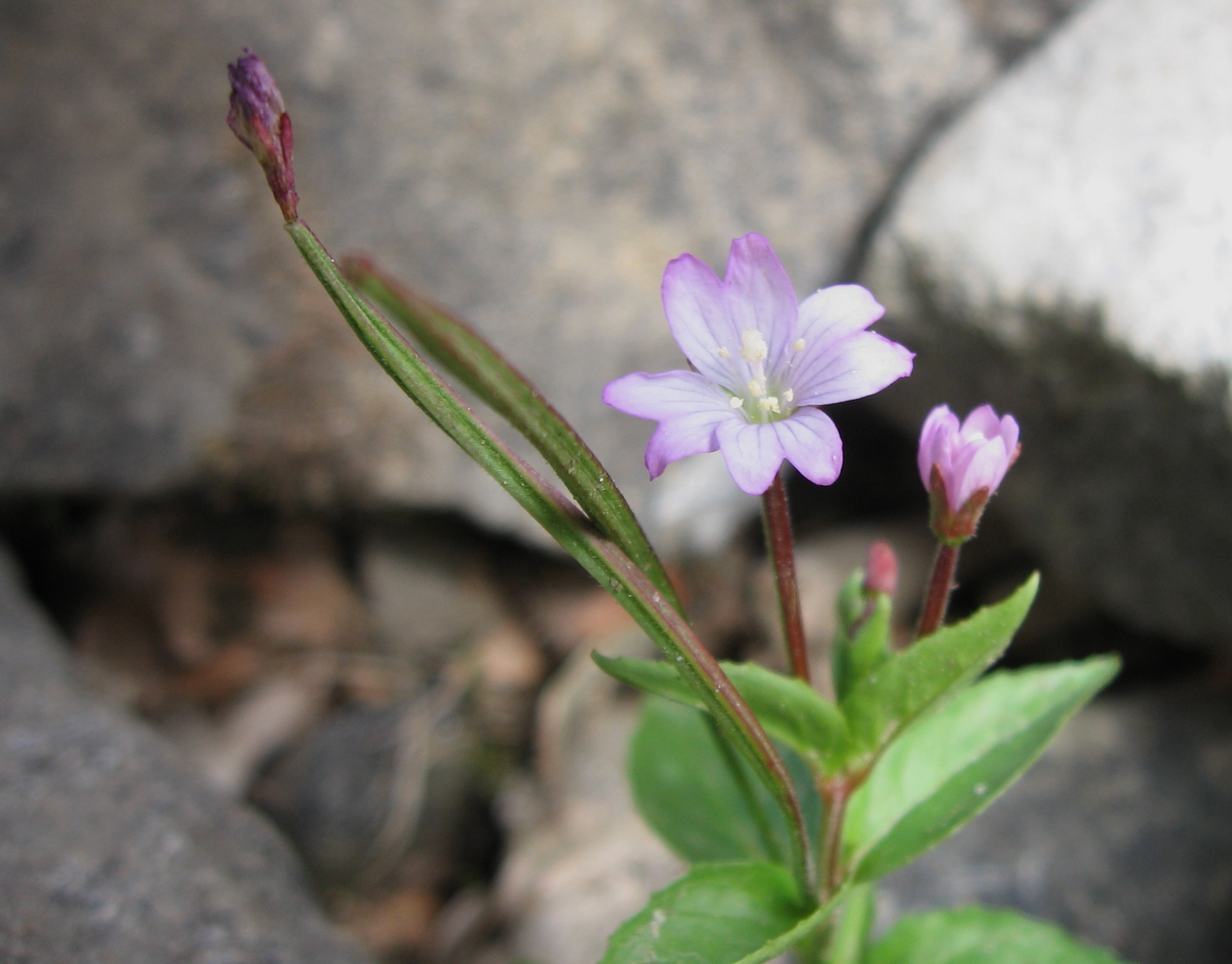 Garofanino basilichino (Epilobium alsinifolium Vill.)